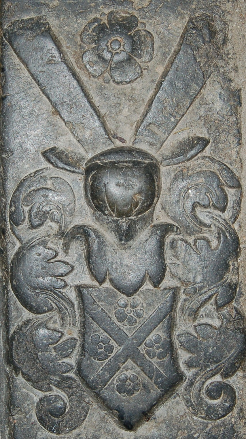 Kane gravstein Hedrum kirke